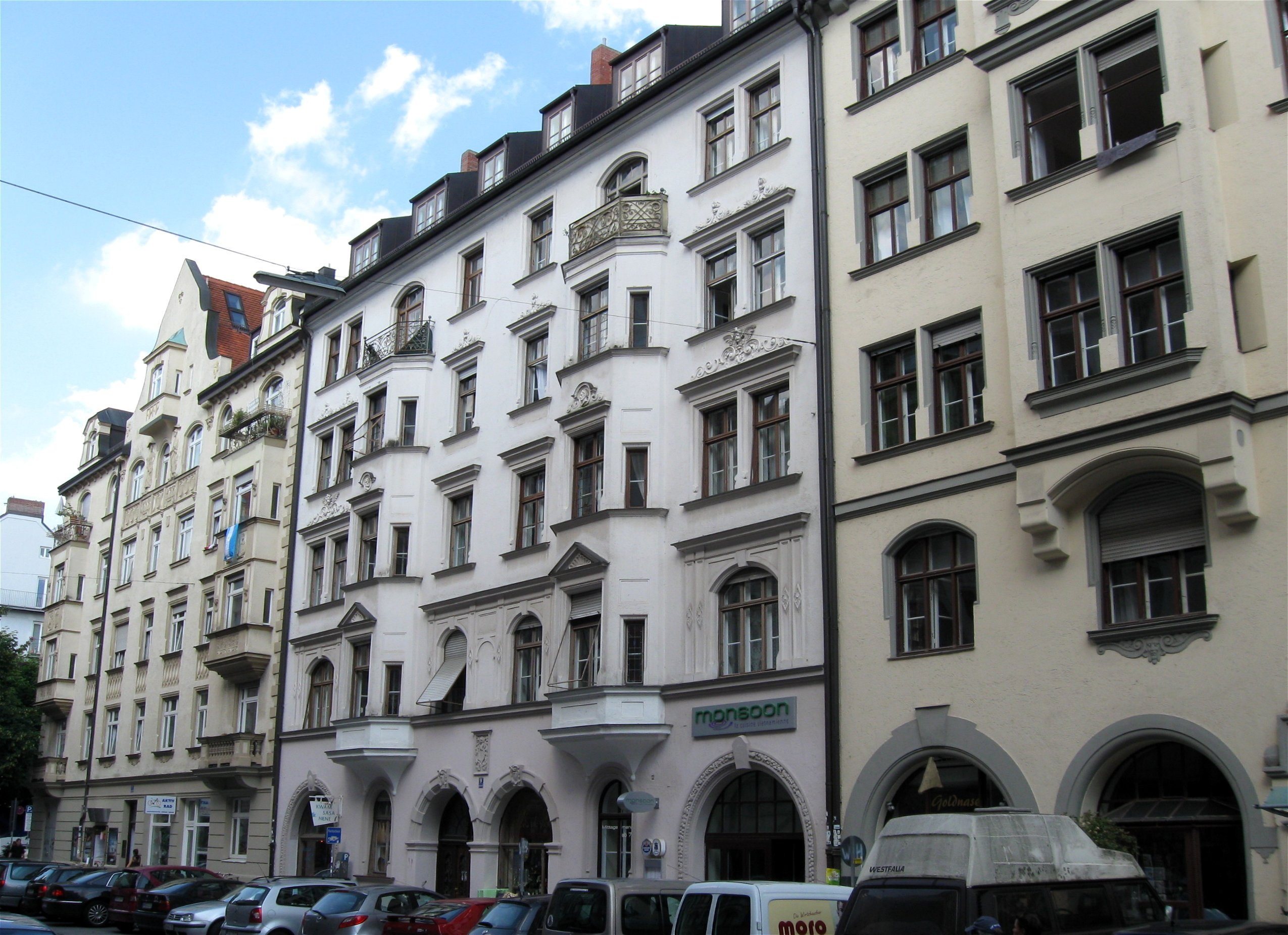 Hans-Sachs-Straße 7, 9, 11